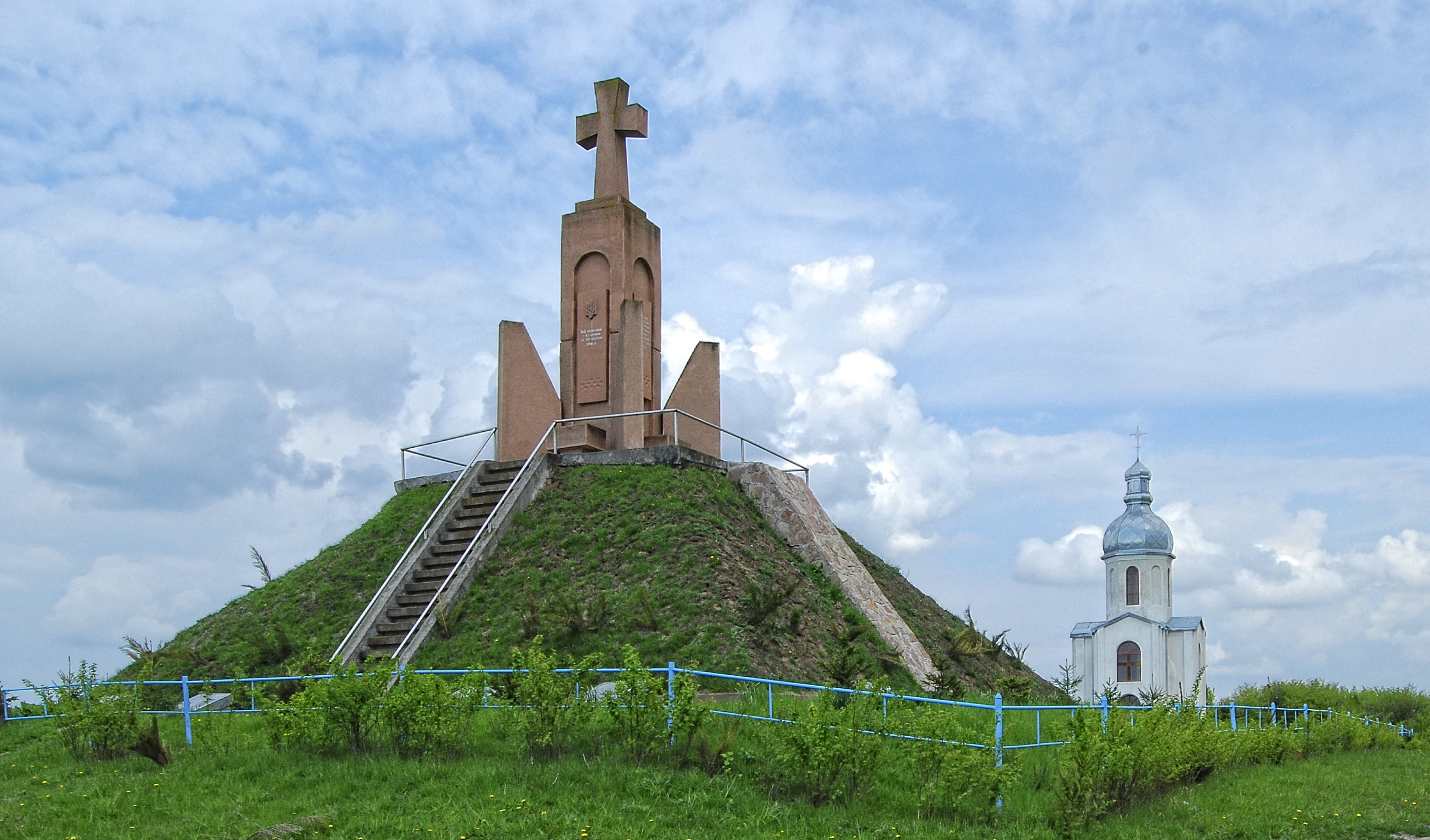 Пам'ятний хрест і капличка на місці боїв Легіону Українських Січових Стрільців з військами Російської імперії під час І Світової війни на г. Лисоні коло Бережан